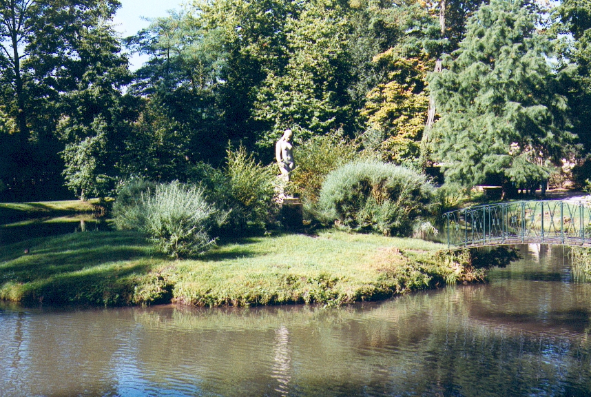 Vue sur l'îlot et l'étang du parc de la mairie de Gif-sur-Yvette